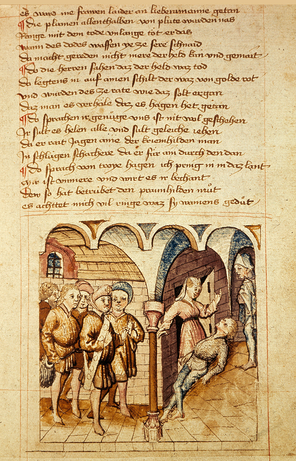 Nibelungenlied. Hundeshagenscher Kodex